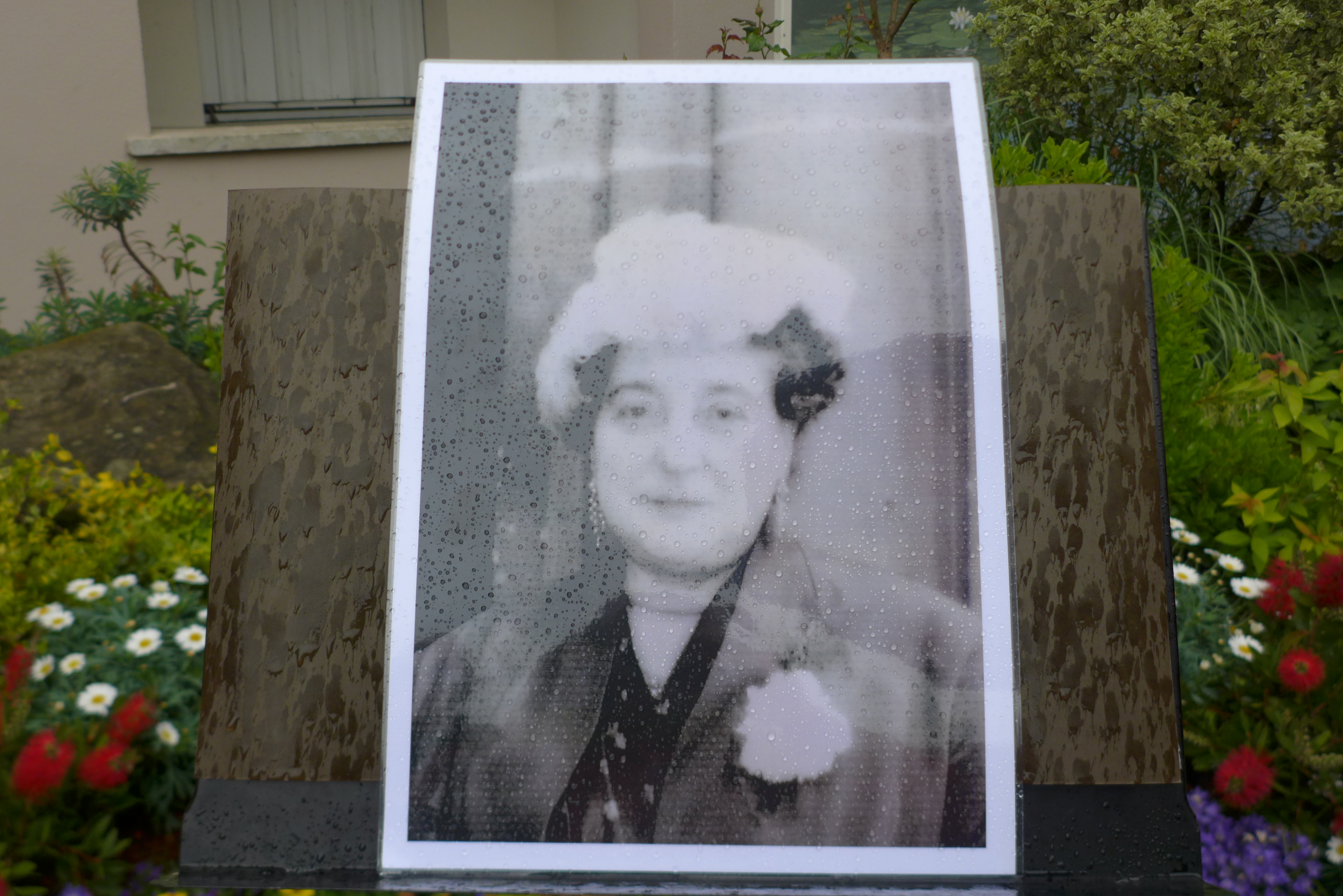 Yvonne Deltour, juste parmi les nations, qui a caché, et sauvé, 31 enfants juifs de 1940 à 1945. Inauguration de la stèle comémorative le 29 avril 2018, à Enghien-les-Bains (Val d'Oise).